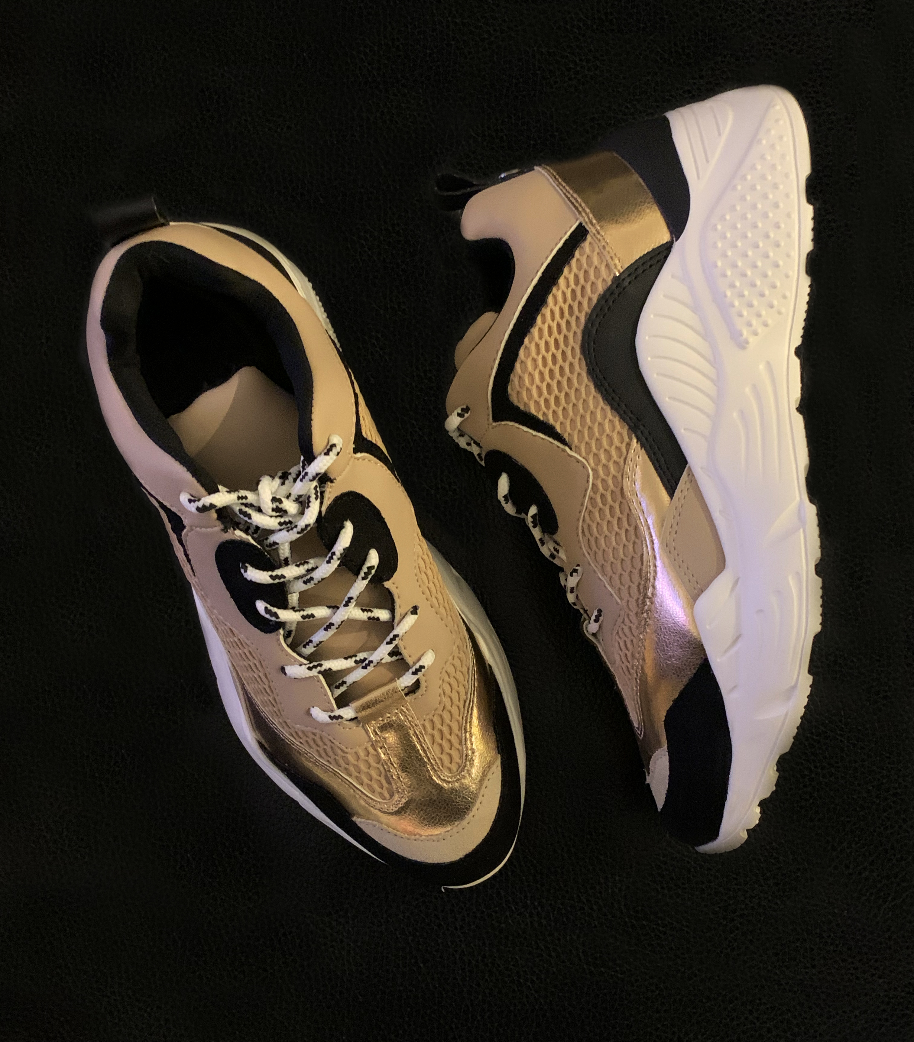 Bild eines Dad sneakers